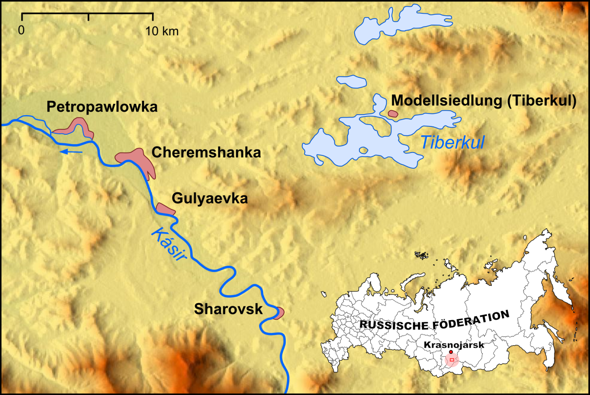 Karte der Orte des Ökopolis Tiberkul in der Region Krasnojarsk, gegründet von Sergei Anatoljewitsch Torop